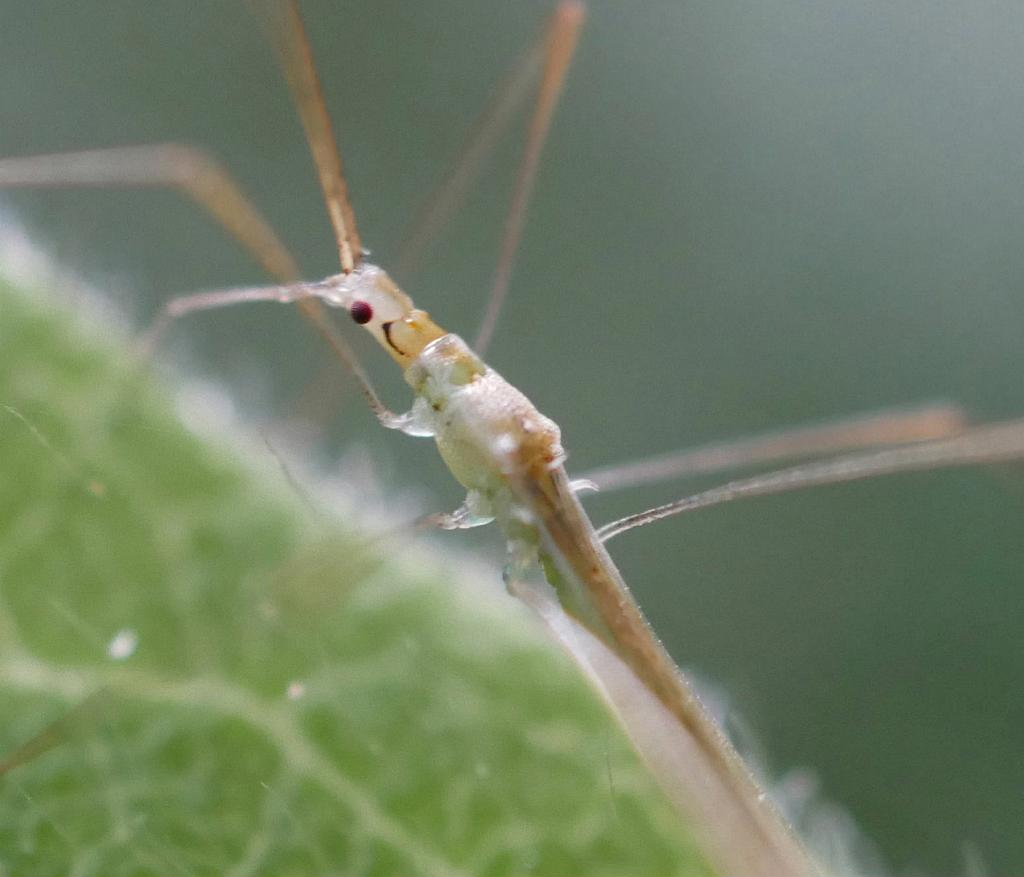 2019/08/08 和歌山県田辺市：Tanabe City. Wakayama Pref. Japan